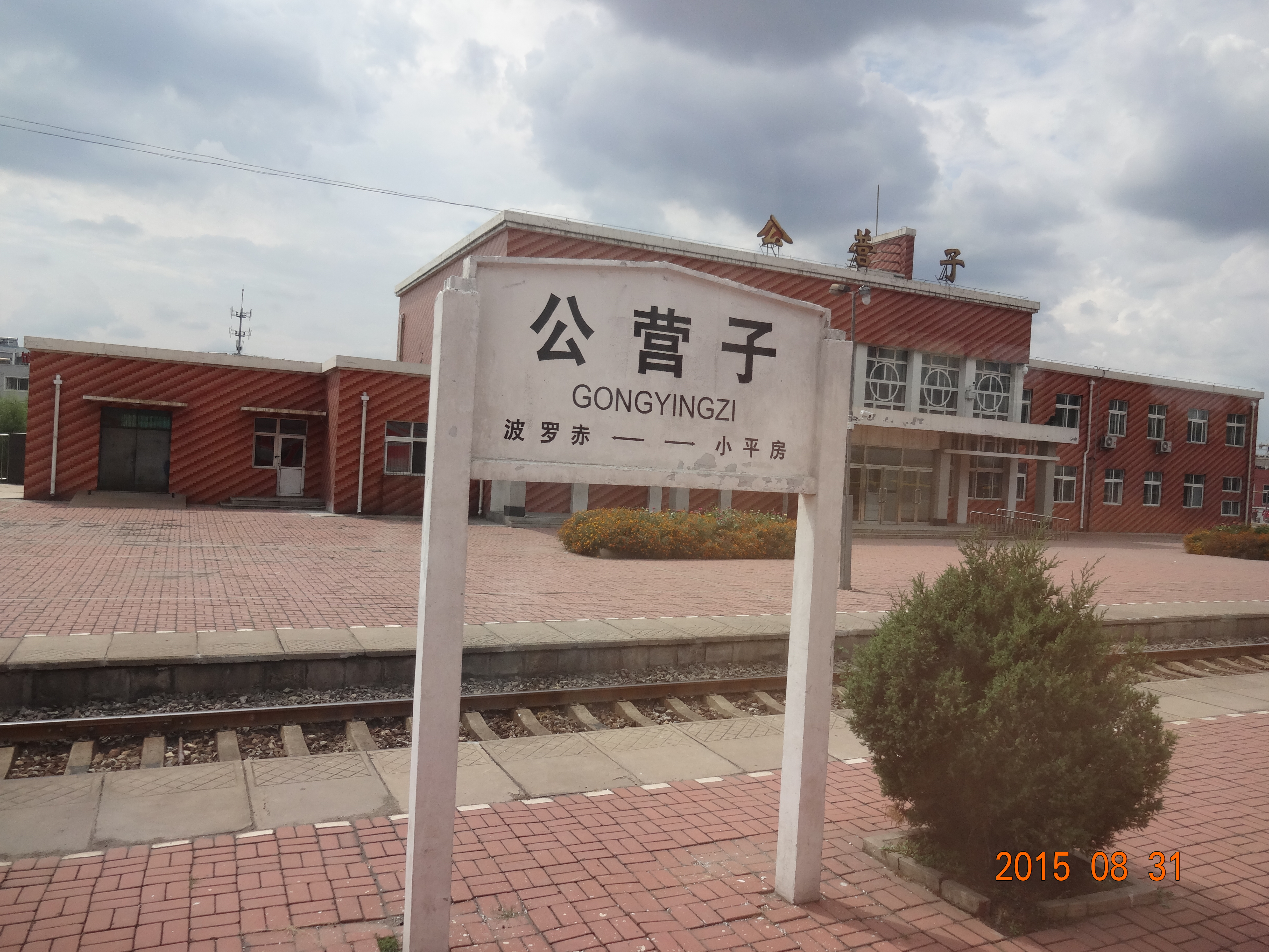 公营子站